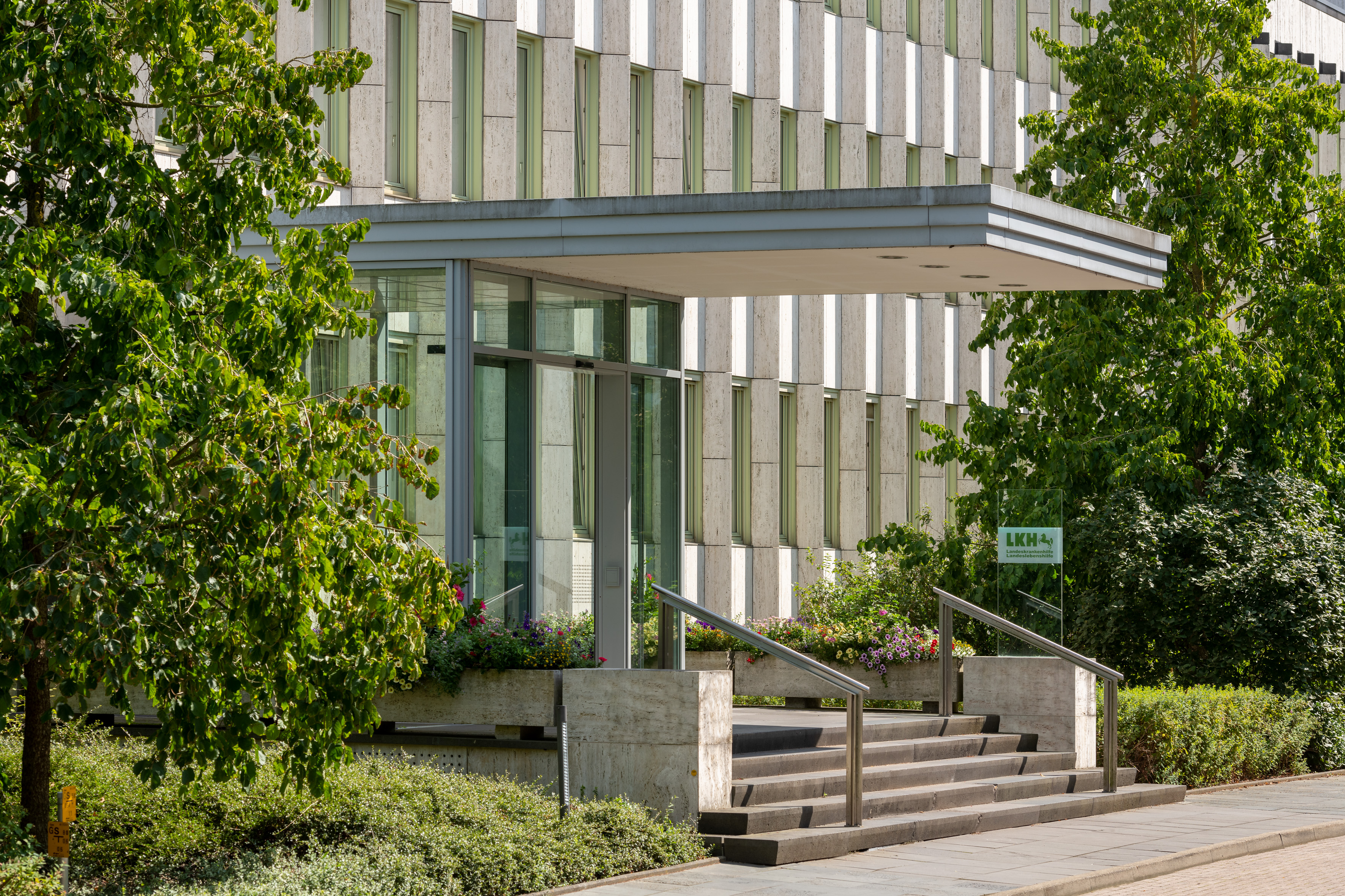 Eingangsbereich der Hauptverwaltung in Lüneburg